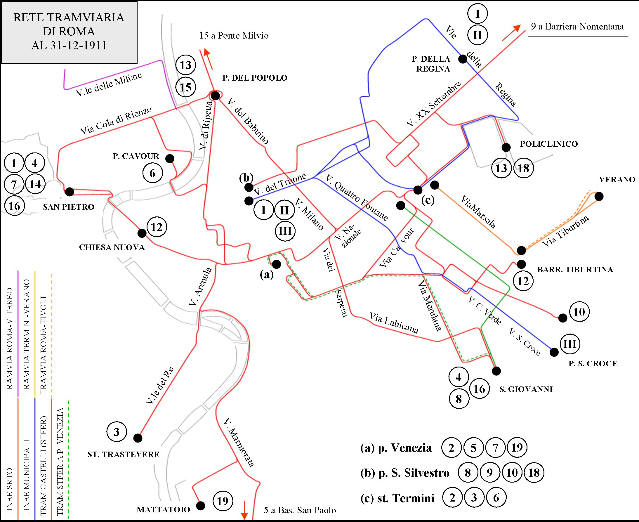 Mappa della rete tranviaria di Roma al 31 dicembre 1911.